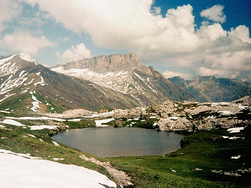 Sanetschpas